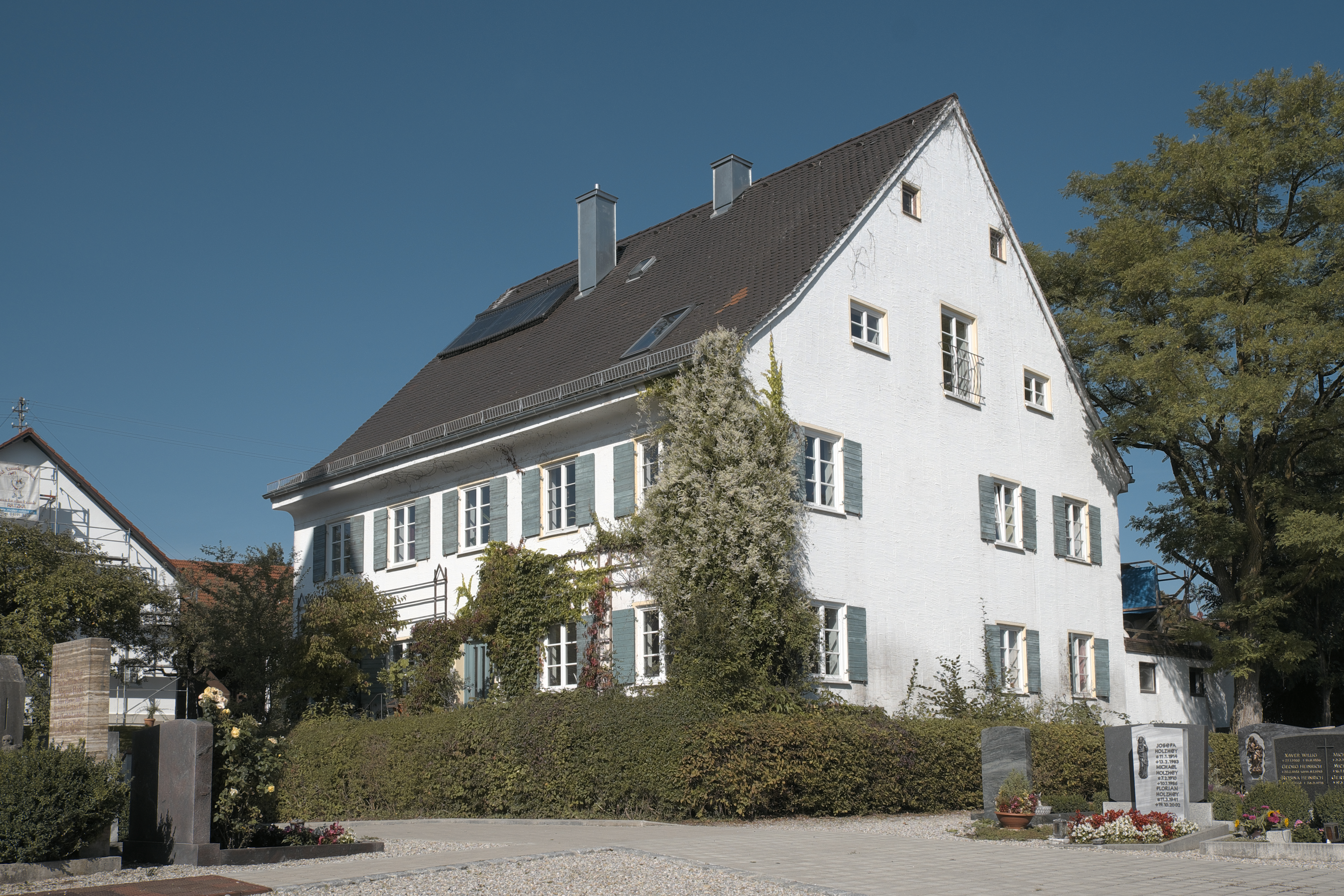 Ehemaliges Pfarrhaus in der Magnus-Hackl-Straße 4 in Penzing im Landkreis Landsberg am Lech (Bayern/Deutschland)